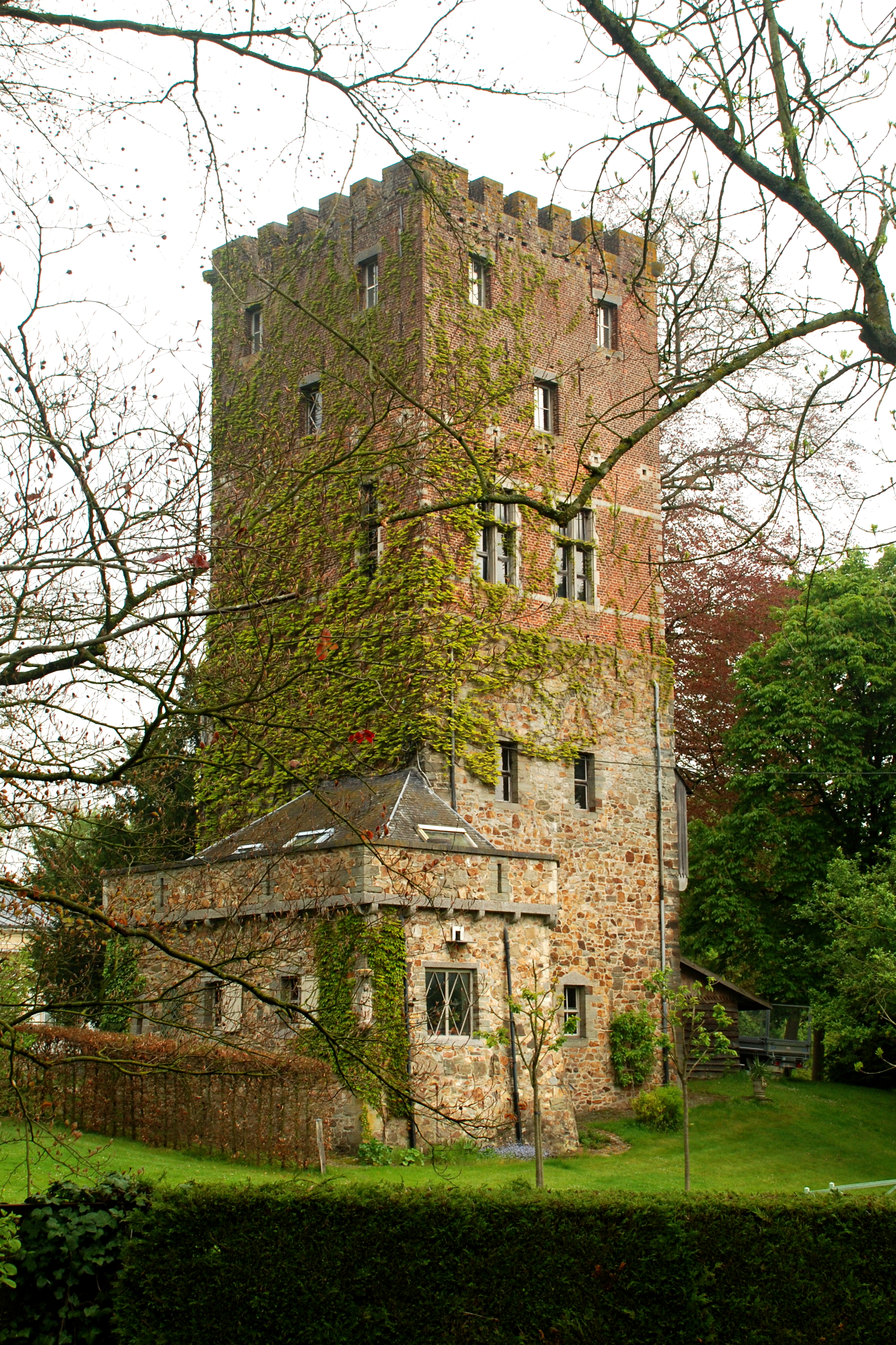 Belgique - Brabant wallon - Mont-Saint-Guibert - Hévillers - Donjon de Bierbais